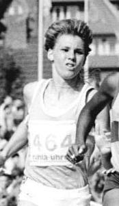 ADN-ZB Häßler 23.6.89 Neubrandenburg: Leichtathletik-Sportfest um den "Vier-Tore-Pokal"- Jahresweltbestleistung im 800-m-Lauf: Ellen Kießling (SC Einheit Dresden).